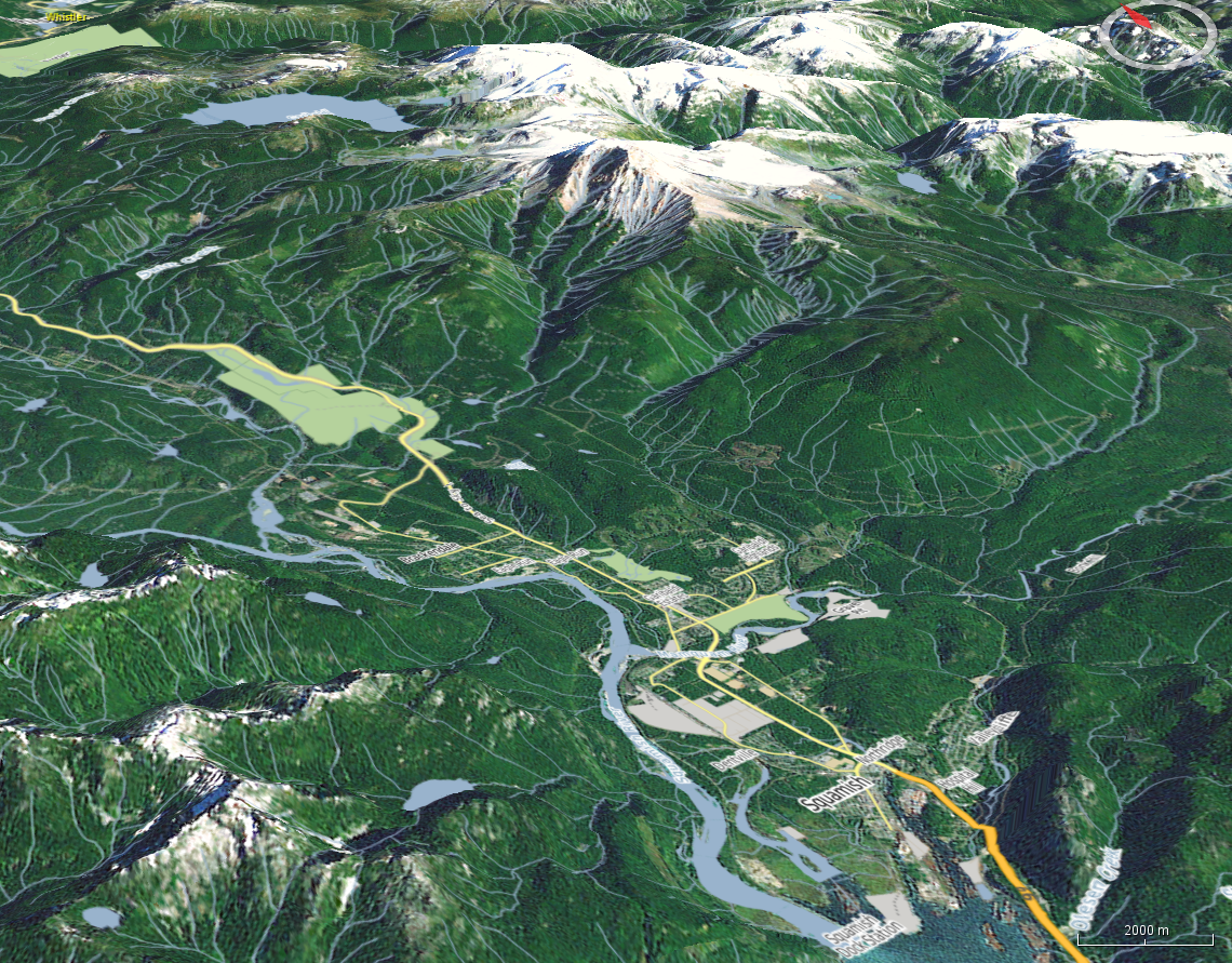 La Squamish et le système hydrographique du mont Garibaldi, au Canada, vus de la Horseshoe Bay (donc vus du sud).